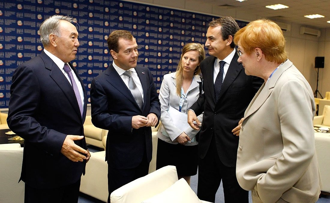 Президент Казахстана Нурсултан Назарбаев, Дмитрий Медведев, Премьер-министр Испании Хосе Луис Родригес Сапатеро, Президент Финляндии Тарья Халонен после заседания Петербургского международного экономического форума.